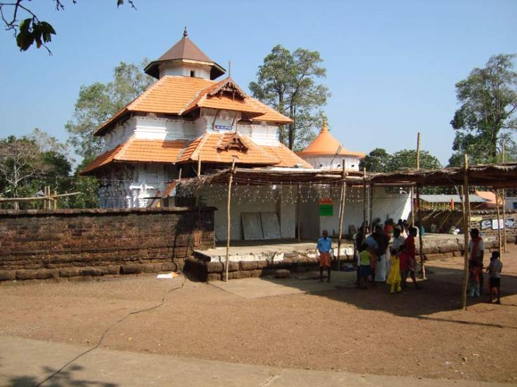 Paramabamthali temple